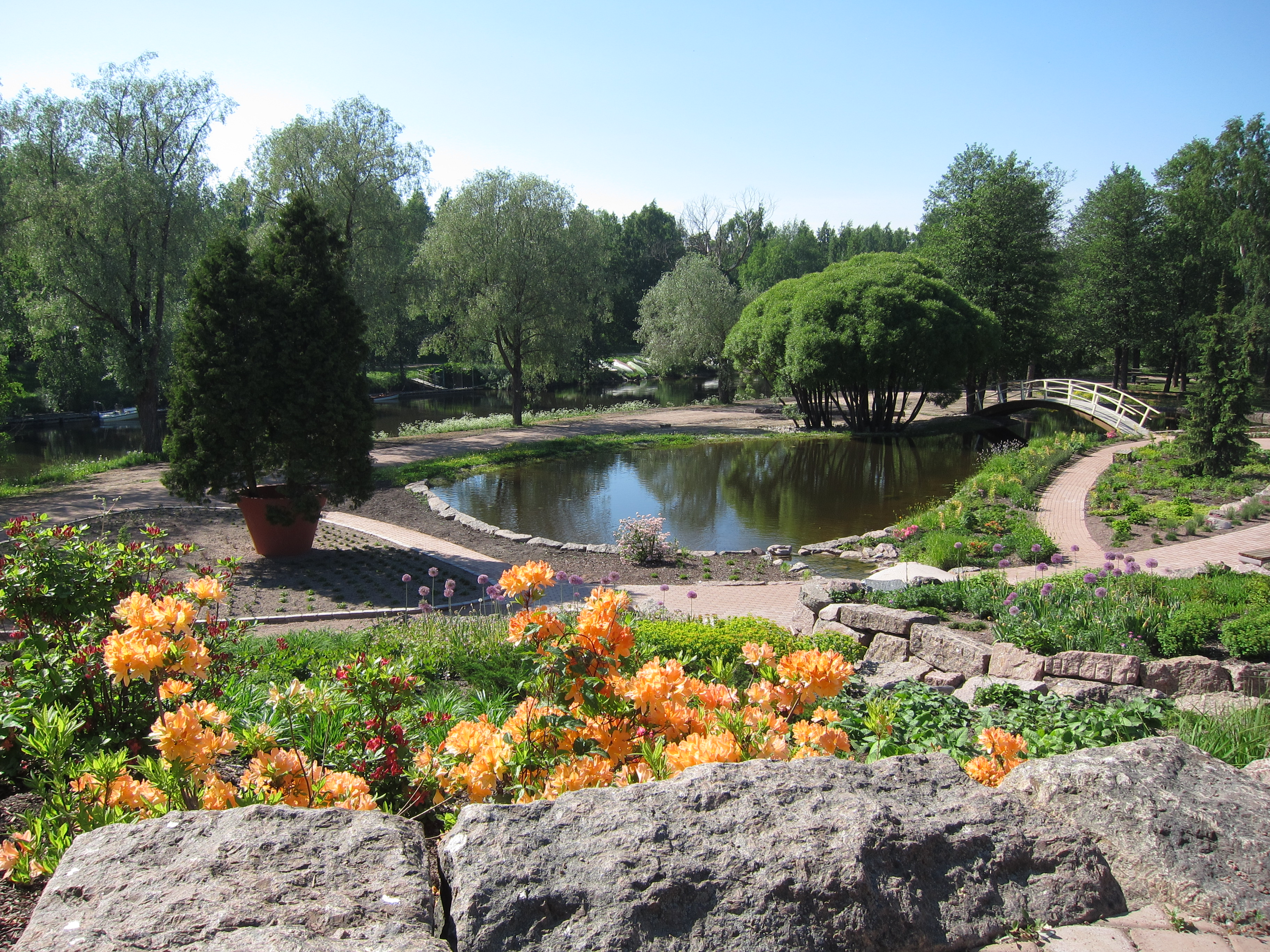 Näkymä Jokipuistosta Kotkassa Karhulan kaupunginosassa.